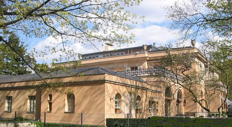 Villa Harteneck, Douglasstraße 7-9, zwischen Hundekehlesee und Dianasee, Berlin-Grunewald. 1912 von Adolf Wollenberg gebaut. Ehemalige Botschaft der Republik Südafrika.